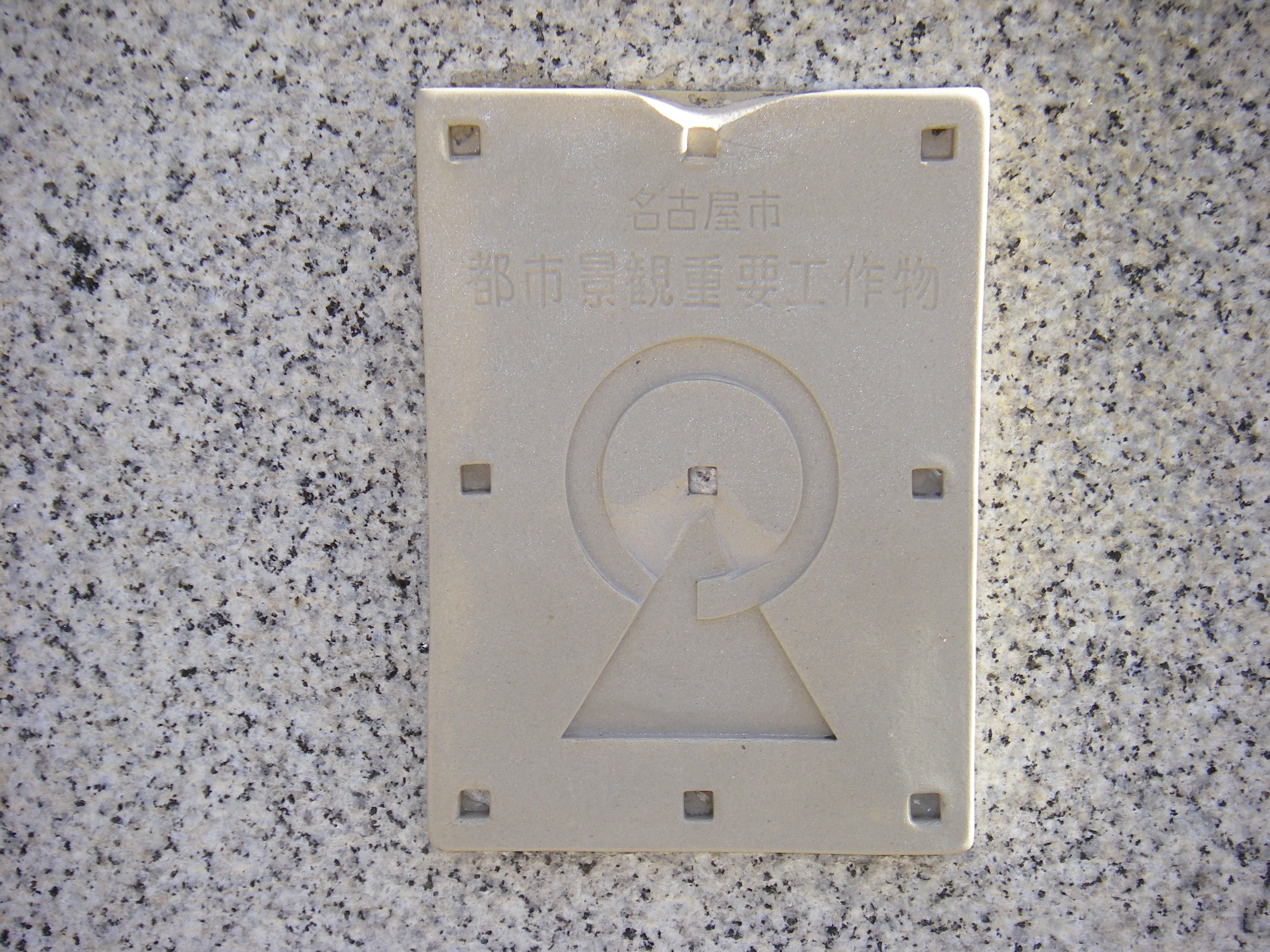 鶴舞公園（愛知県名古屋市昭和区）内噴水塔。 同物件は名古屋市都市景観重要建築物等（工作物）に指定されており。その旨を記したプレート。